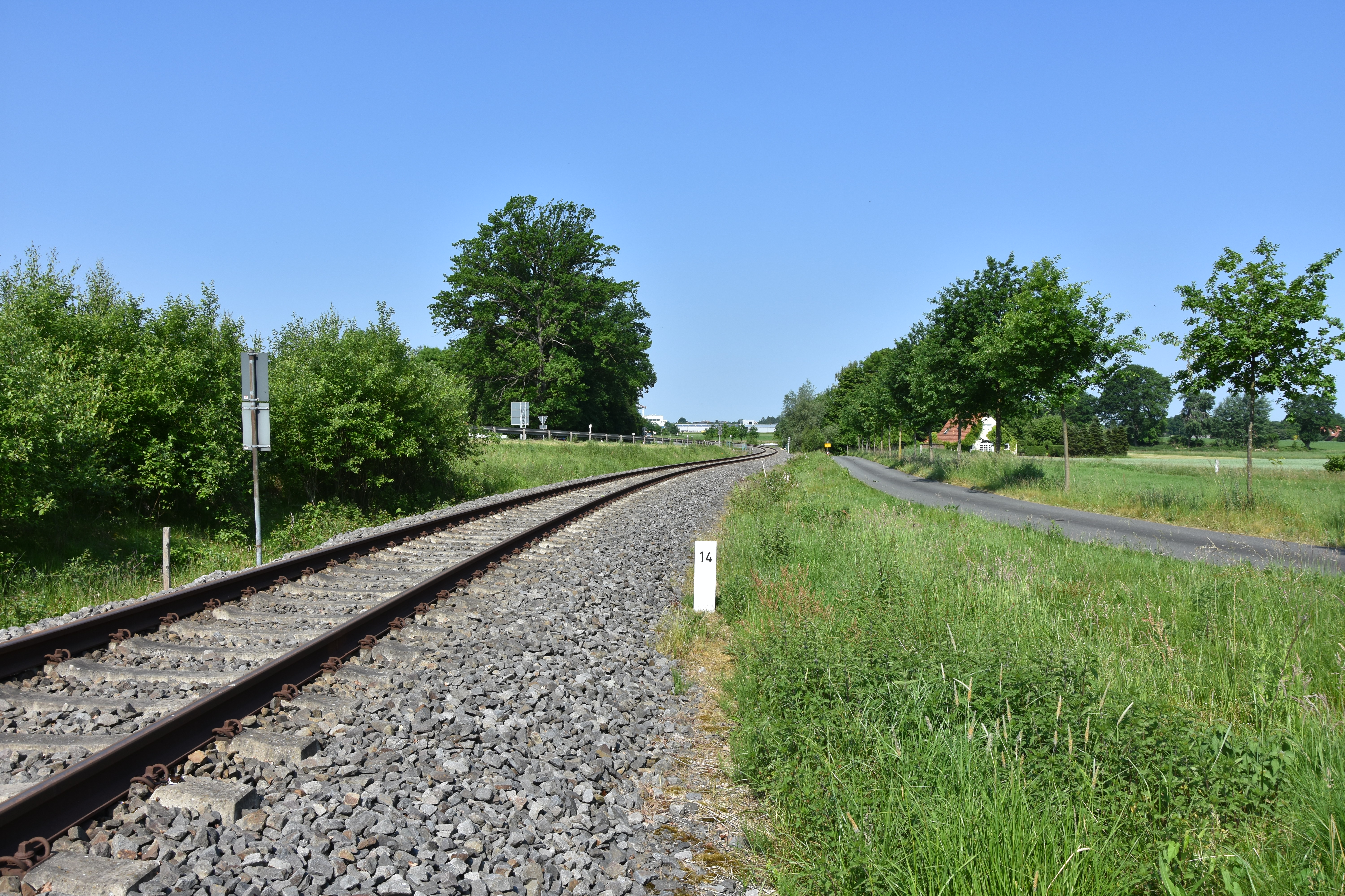 Tecklenburger Nordbahn im Bereich der ehemaligen Haltestelle Langenbrück